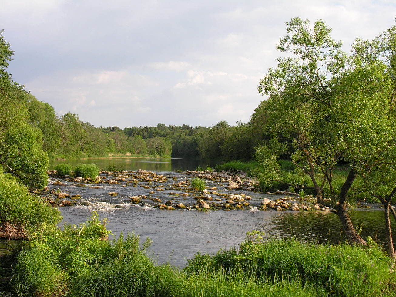 Venta, išardyta užtvanka ties Krakiais, Mažeikių raj. Foto: Algirdas, 2006 m. birželio 19 d., Lietuva